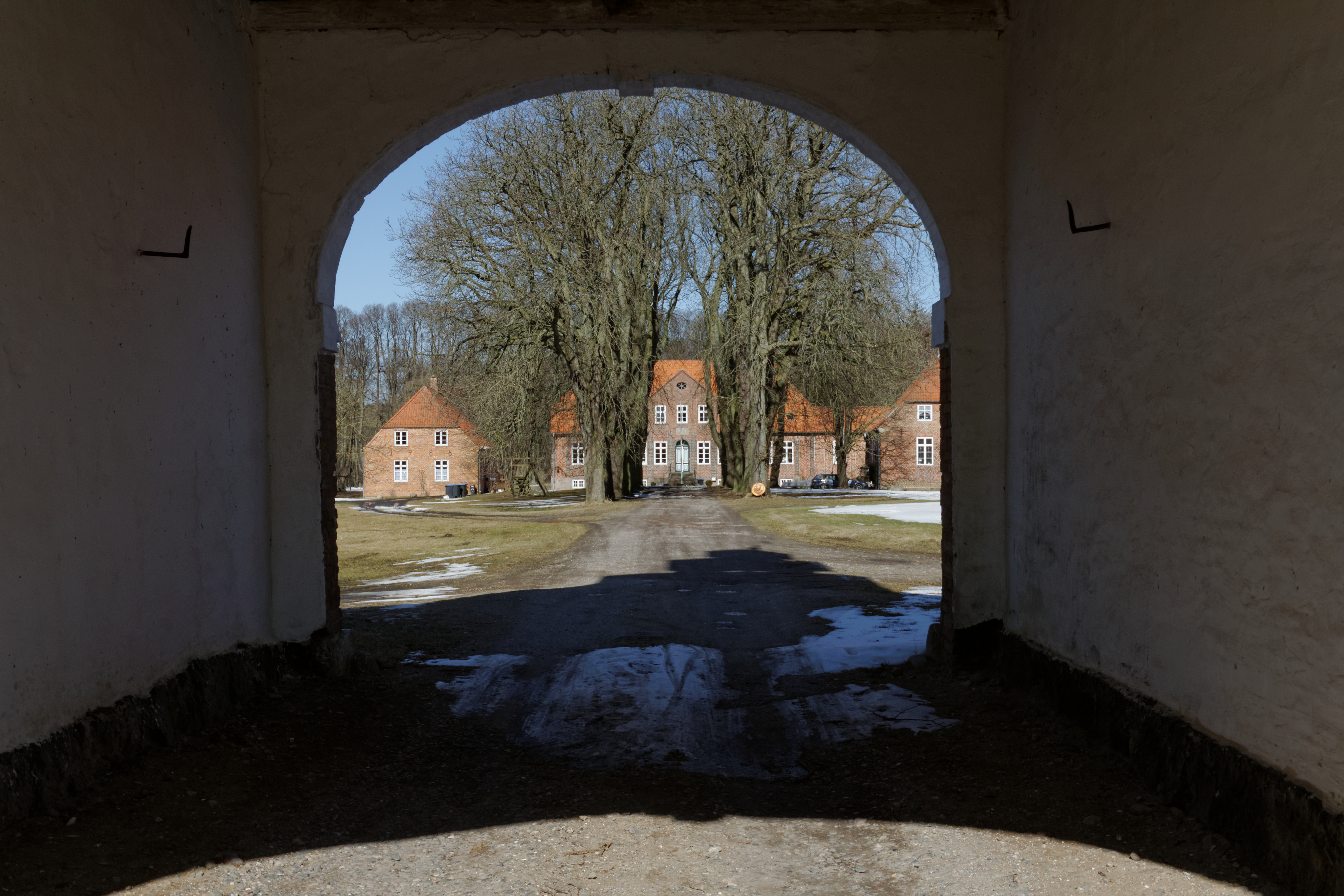 Rieseby, Gut Krieseby; Herrenhaus